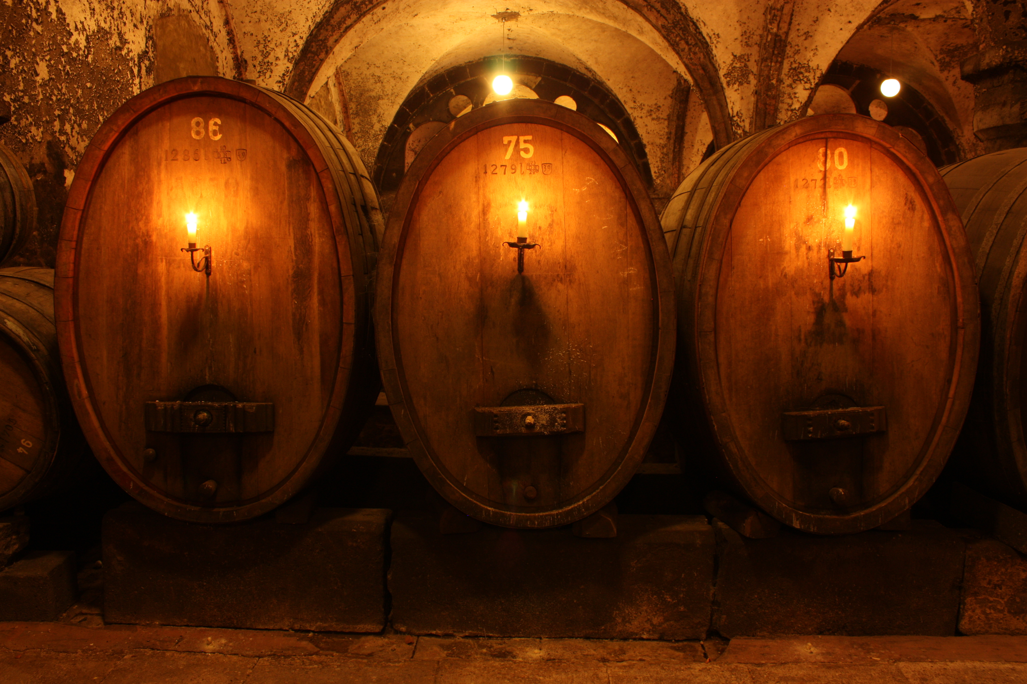 Fässer im Cabinetkeller in der ehemaligen Fraternei des Klosters Eberbach